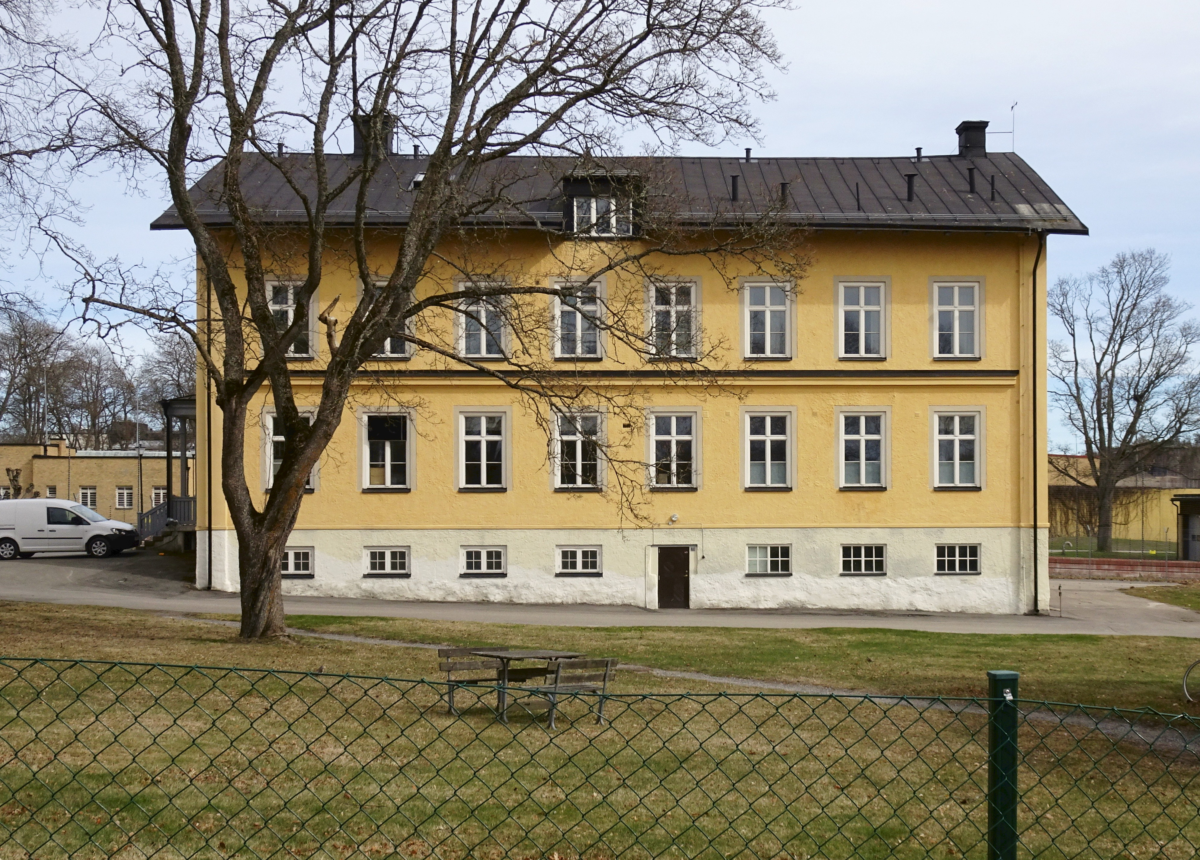 En av Johan Fredrik Åboms flyglar vid Hall